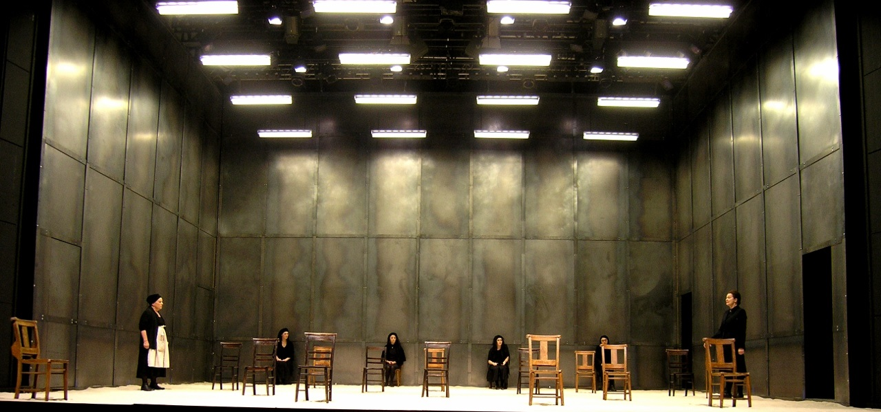 בית ברנרדה אלבה, במאי גדי רול, מעצב תפאורה רוני תורן, מעצב תלבושות רוני תורן, מעצב תאורה ג'ונתן סמיואלס (Jonathan Samuels), קובנטרי, אנגליה 2008